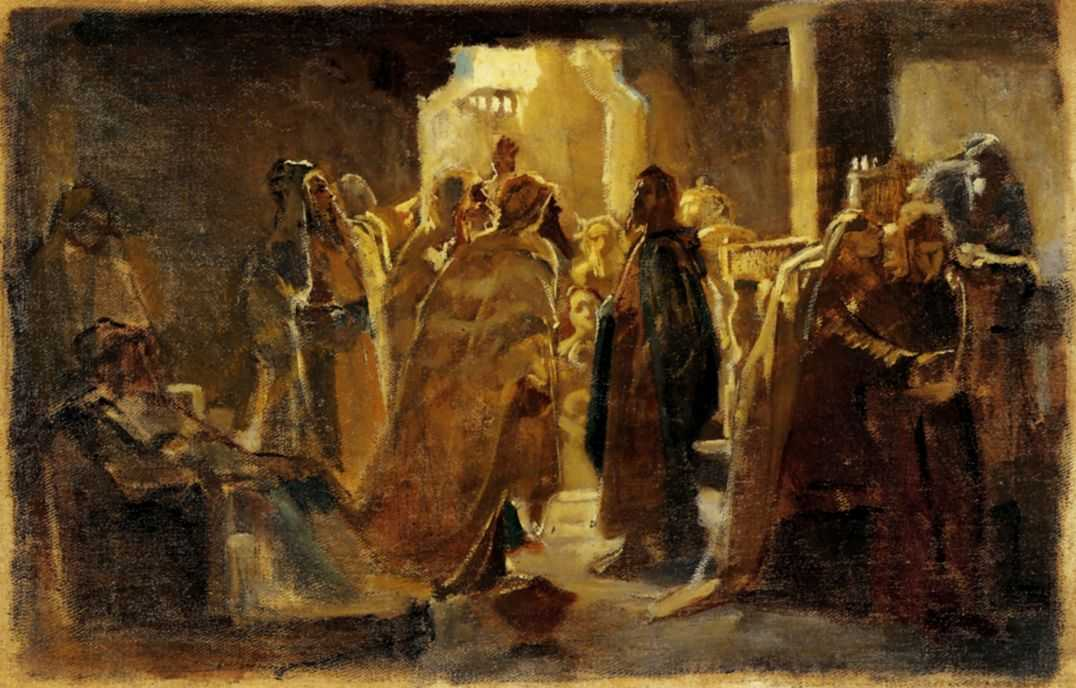 Ге Николай. Христос в синагоге. 1868